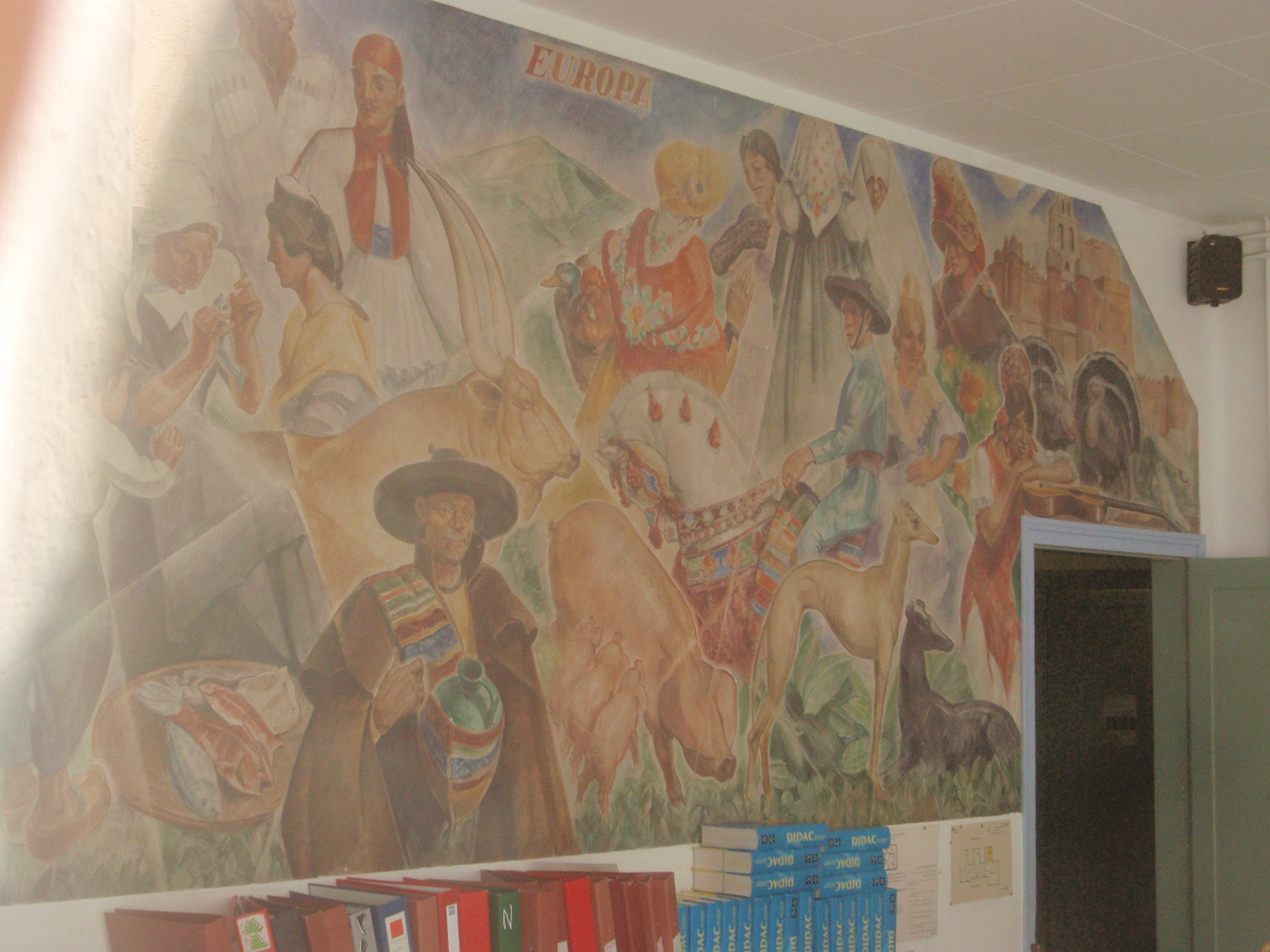 Escoles Doctor Robert (Camprodon)